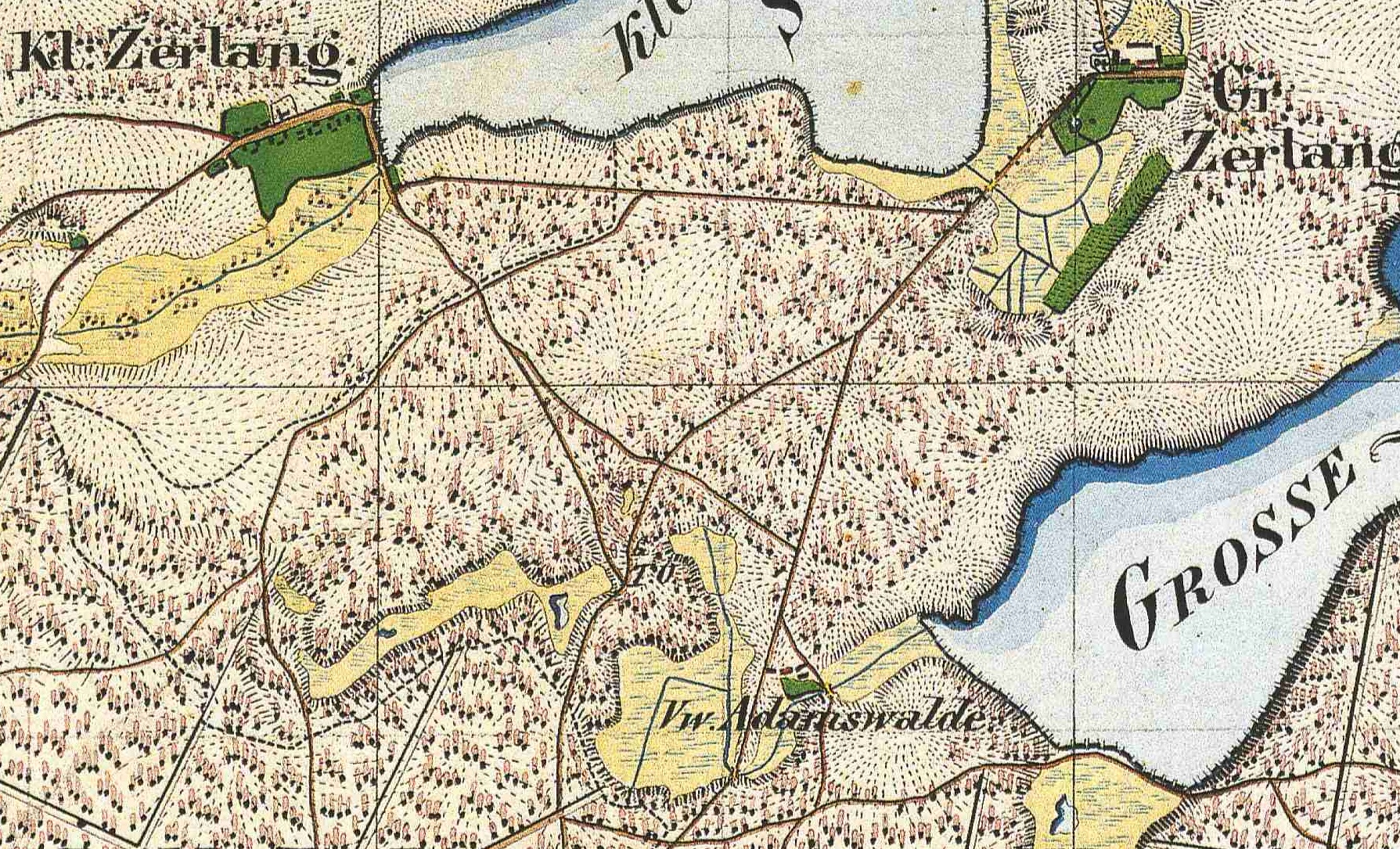 Großzerlang, Kleinzerlang und Adamswalde, Stadt Rheinsberg, Landkreis Ostprignitz-Ruppin, Brandenburg, Ausschnitt aus dem Urmesstischblatt 2843 Rheinsberg von 1825